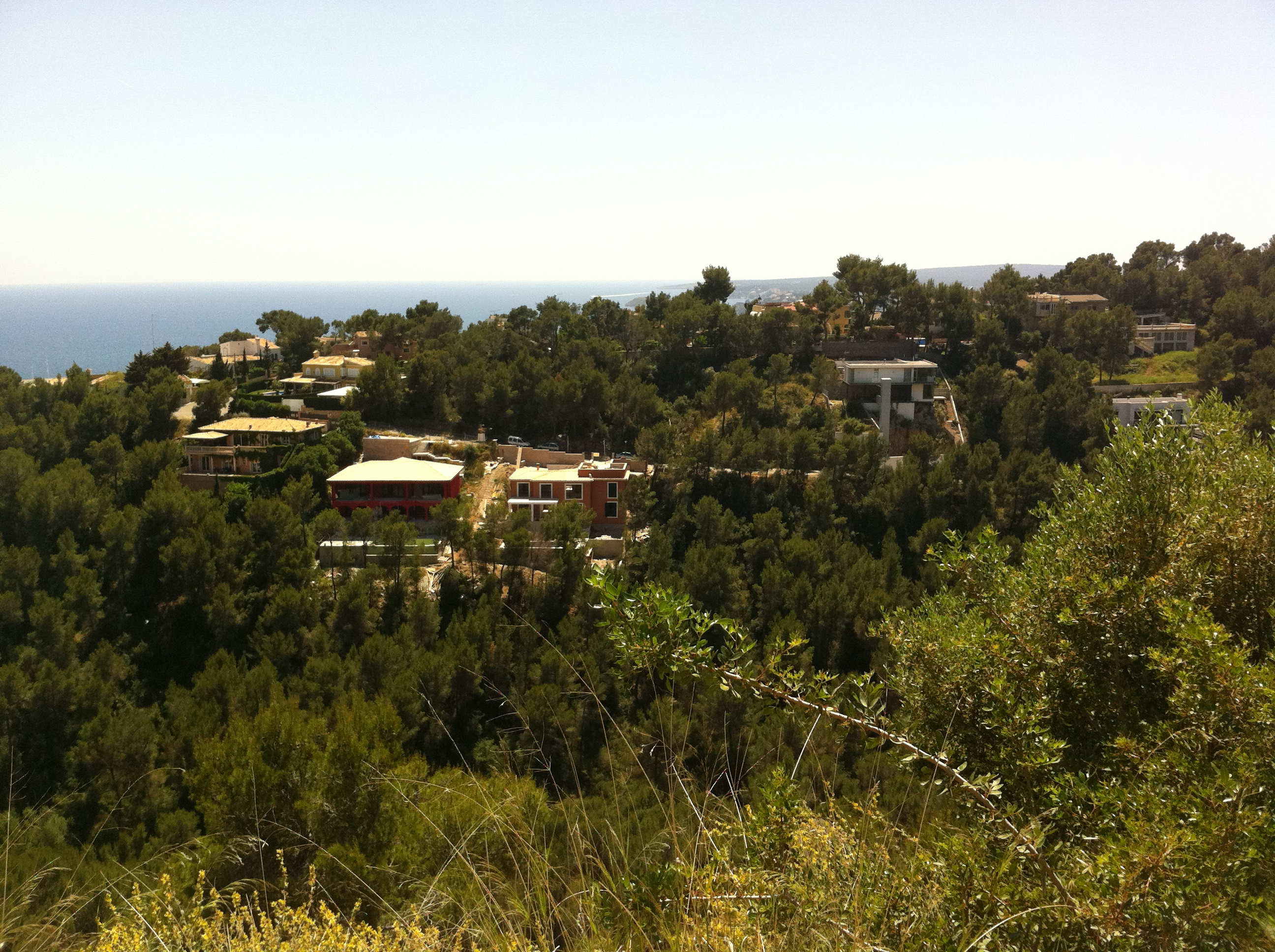 Costa d'en Blanes (Calvià - Mallorca)